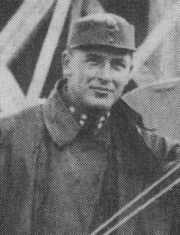 Bohumil Munzar (1897-1922)